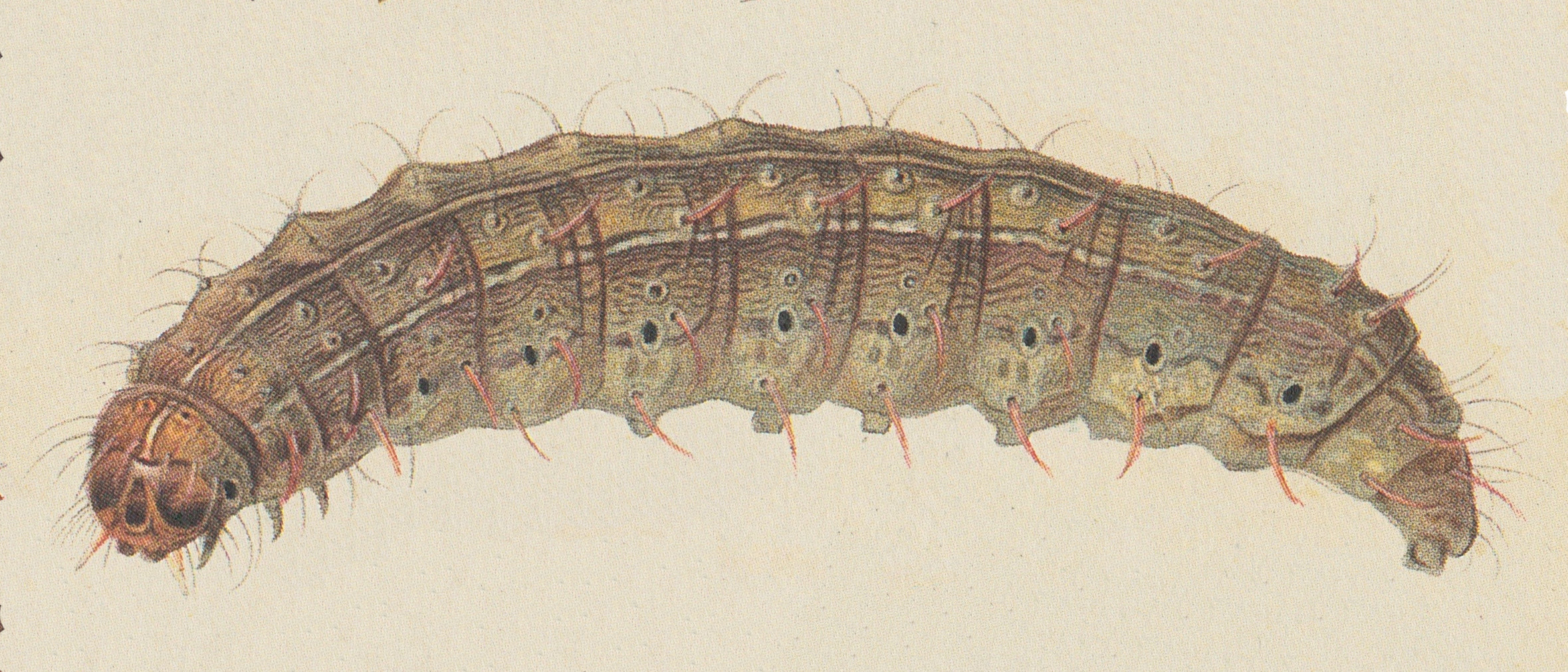 Hoplodrina octogenaria (Goeze, 1781)